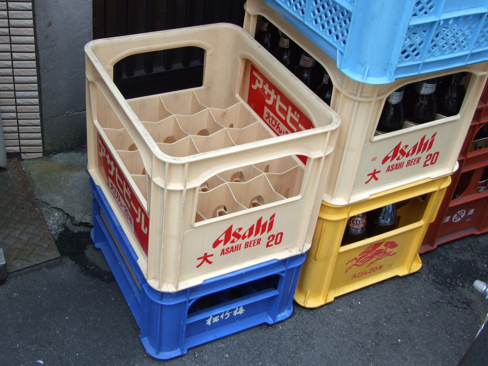 Beercrate01